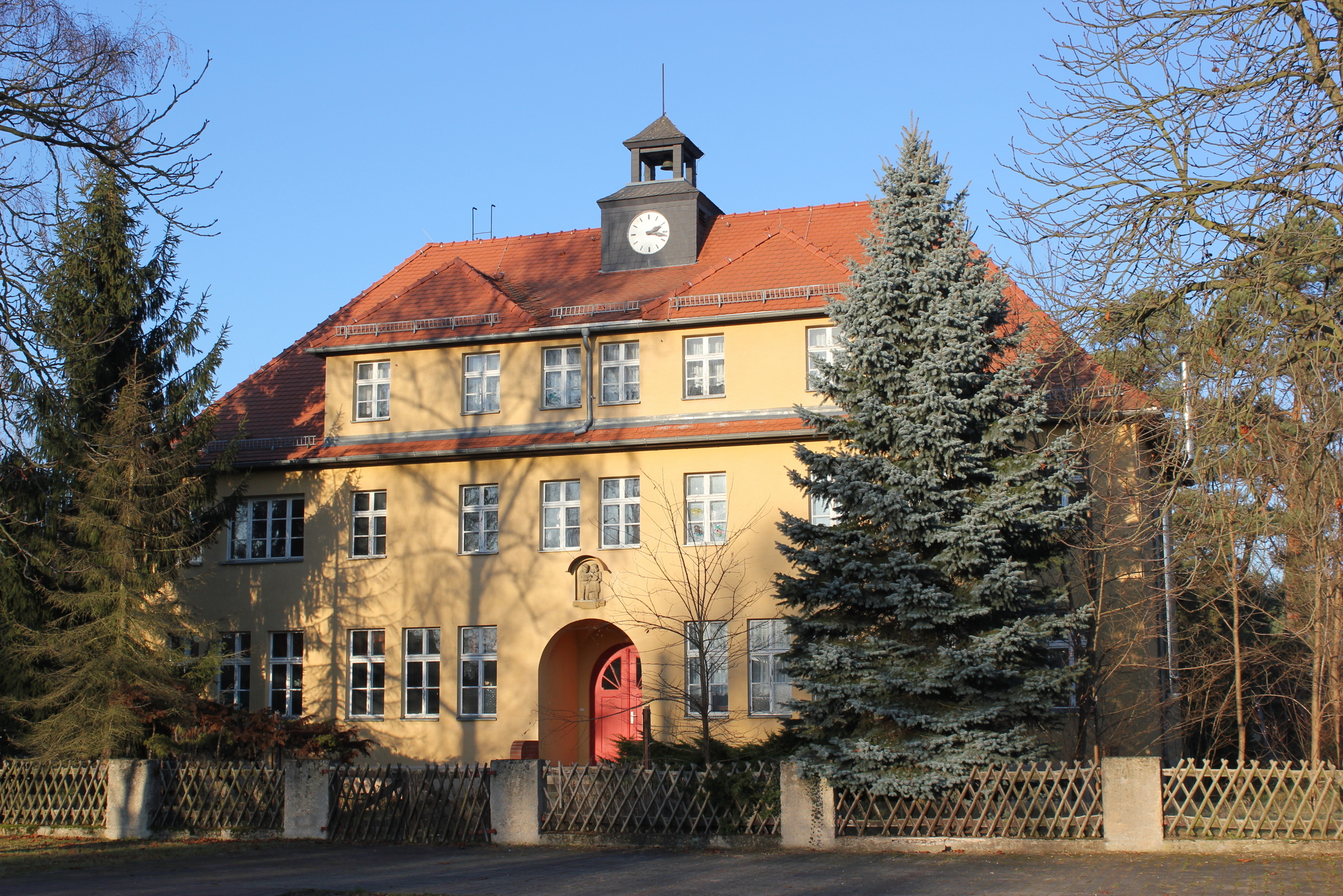 Hornjoserbsce: Stara šula w Komorowje (gmejna Wulka Dubrawa).